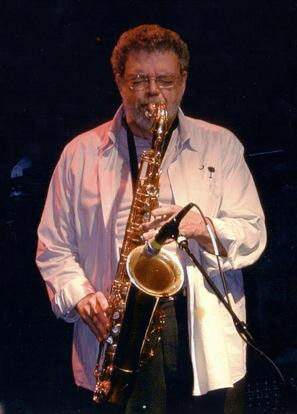 Don Wise playing saxophon during a concert in Norway